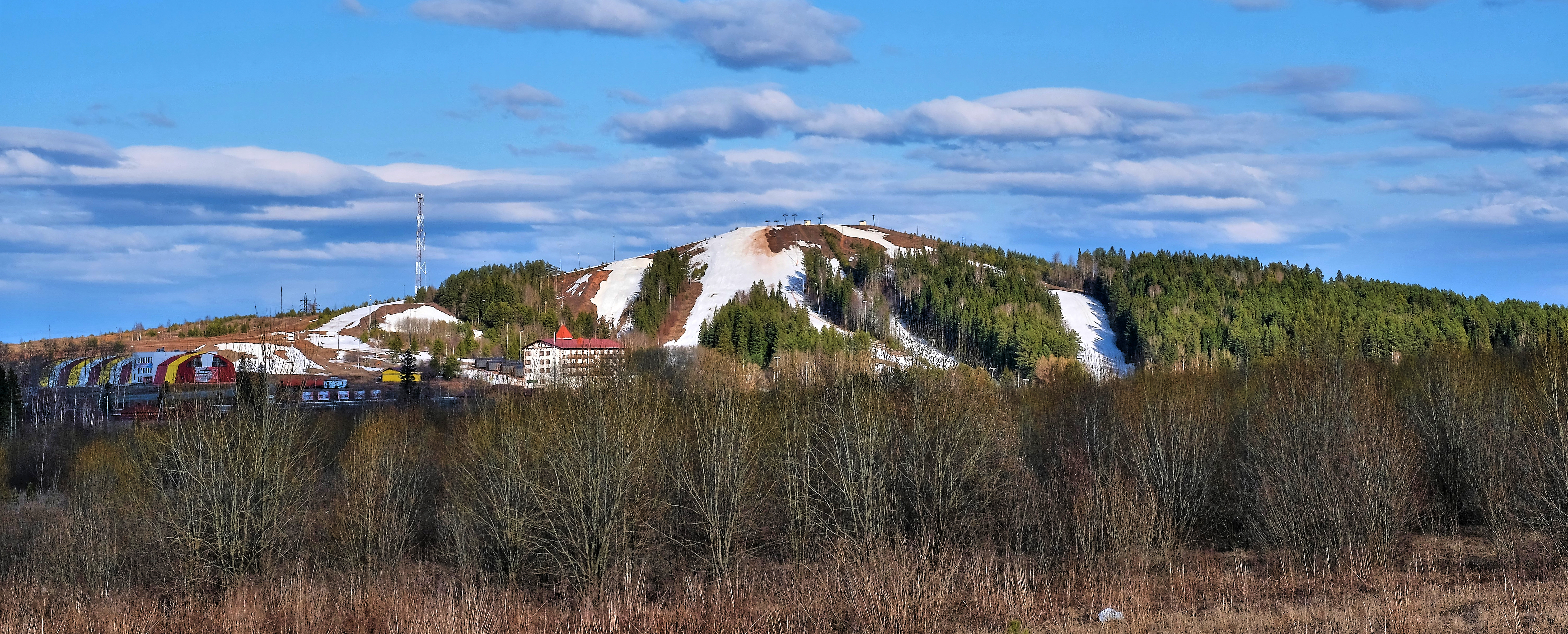 Вид на Чекерил с объездной дороги Ижевска